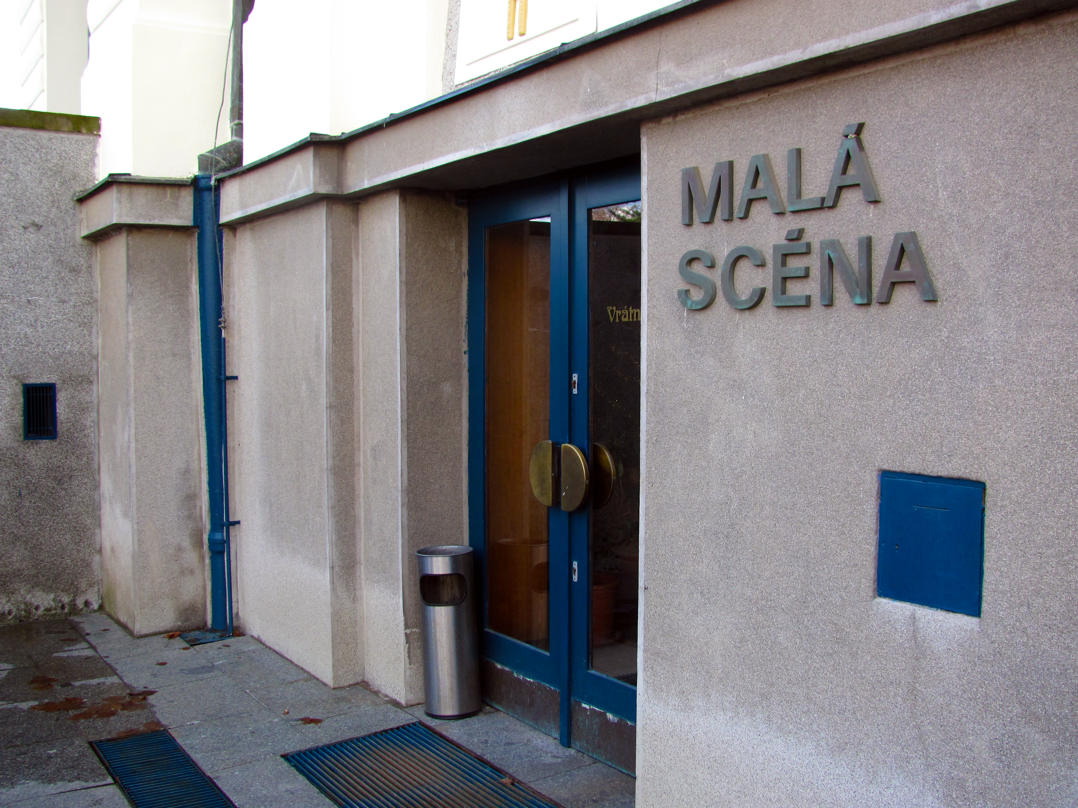 Služební vrátnice a vchod na Malou scénu Městského divadla Mladá Boleslav (otevřena v roce 1981)